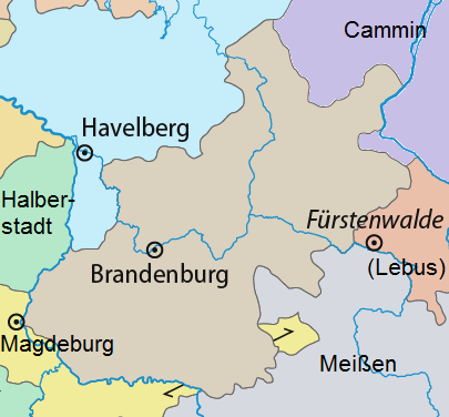 Bistum Brandenburg vor der Reformation (Diözesangrenzen)